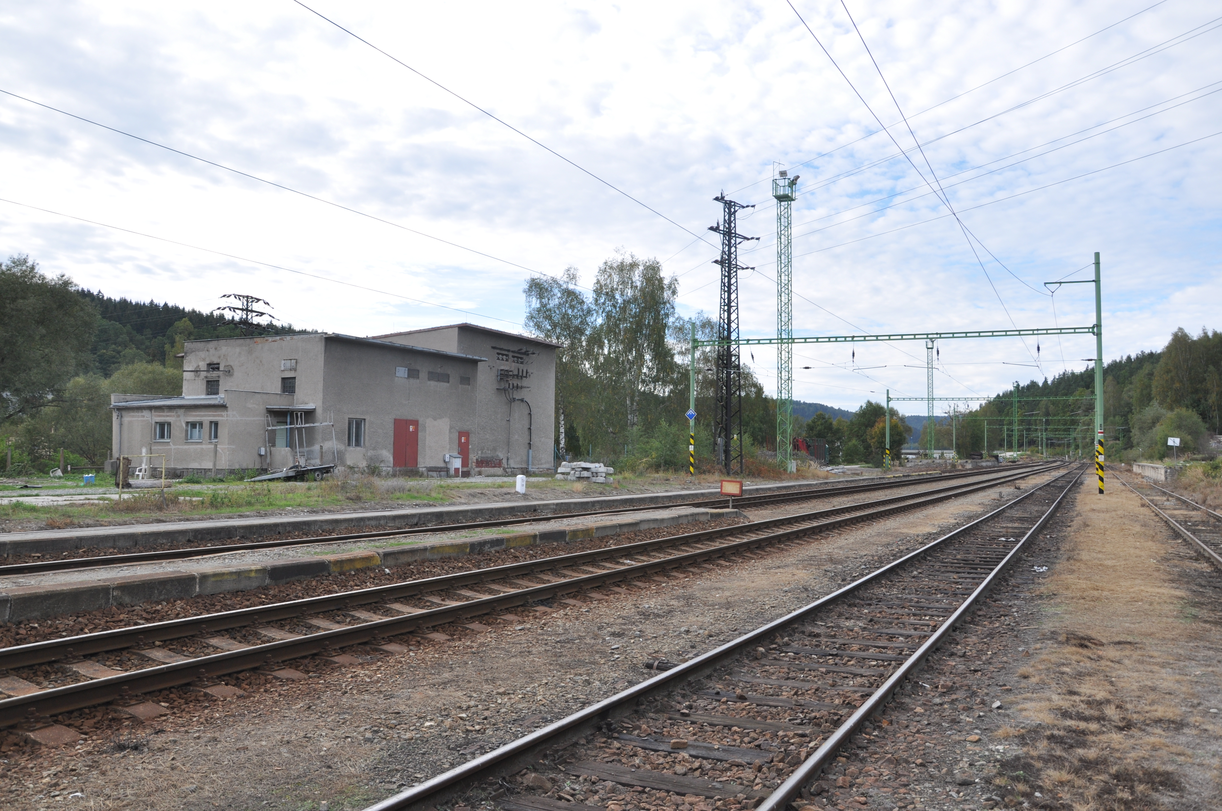 Bahnhof Vyšší Brod klášter, ehemaliges Gleichstrom-Unterwerk